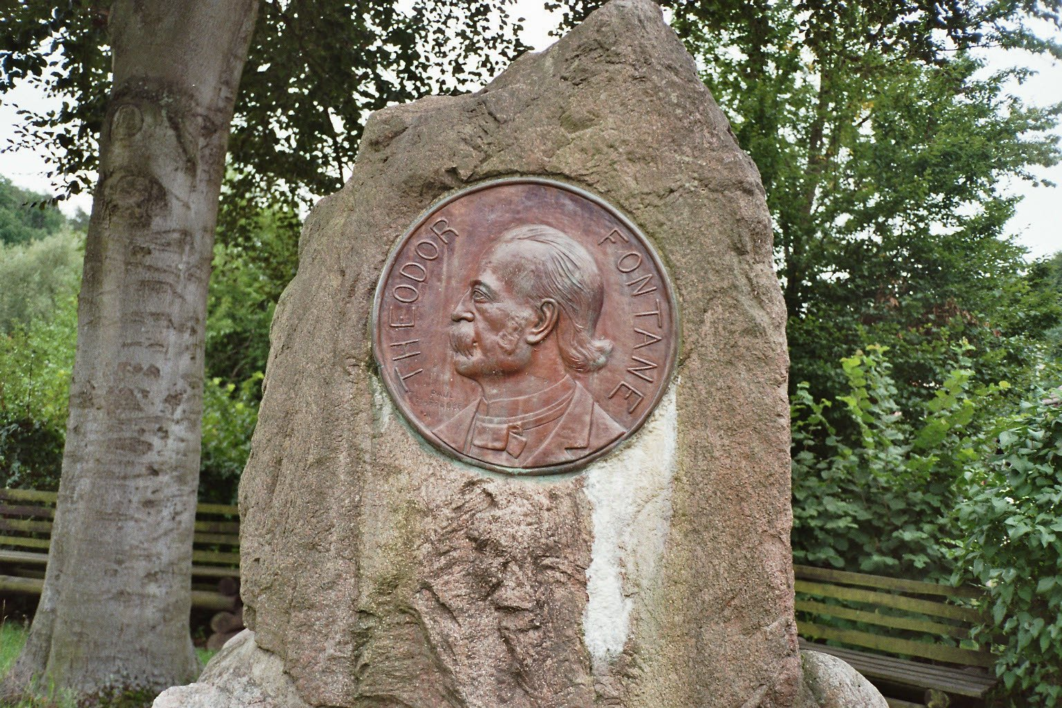 Theodor Fontane im Profil als Treibarbeit bei Falkenberg, Deutschland